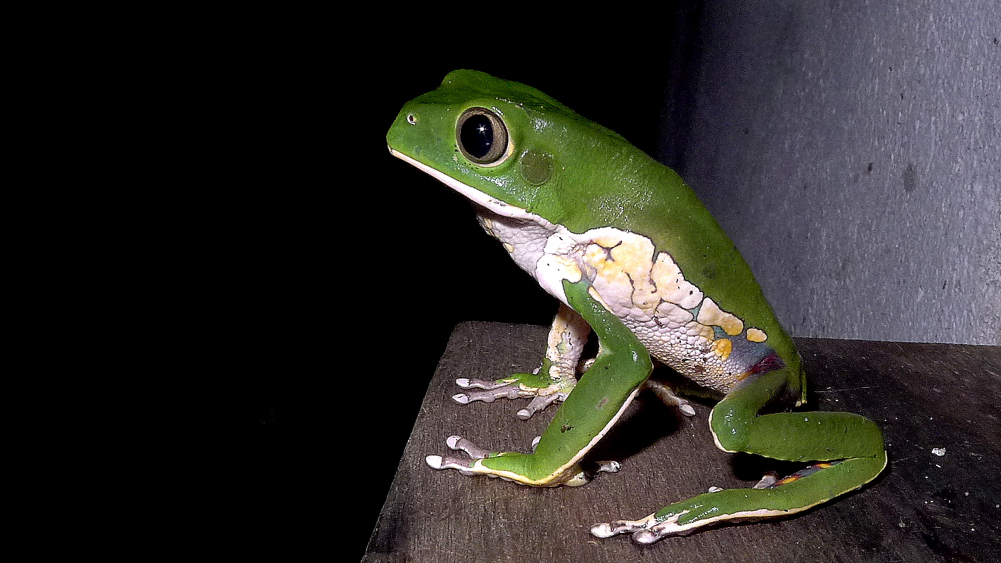 Phyllomedusa bahiana (Lutz, 1925)